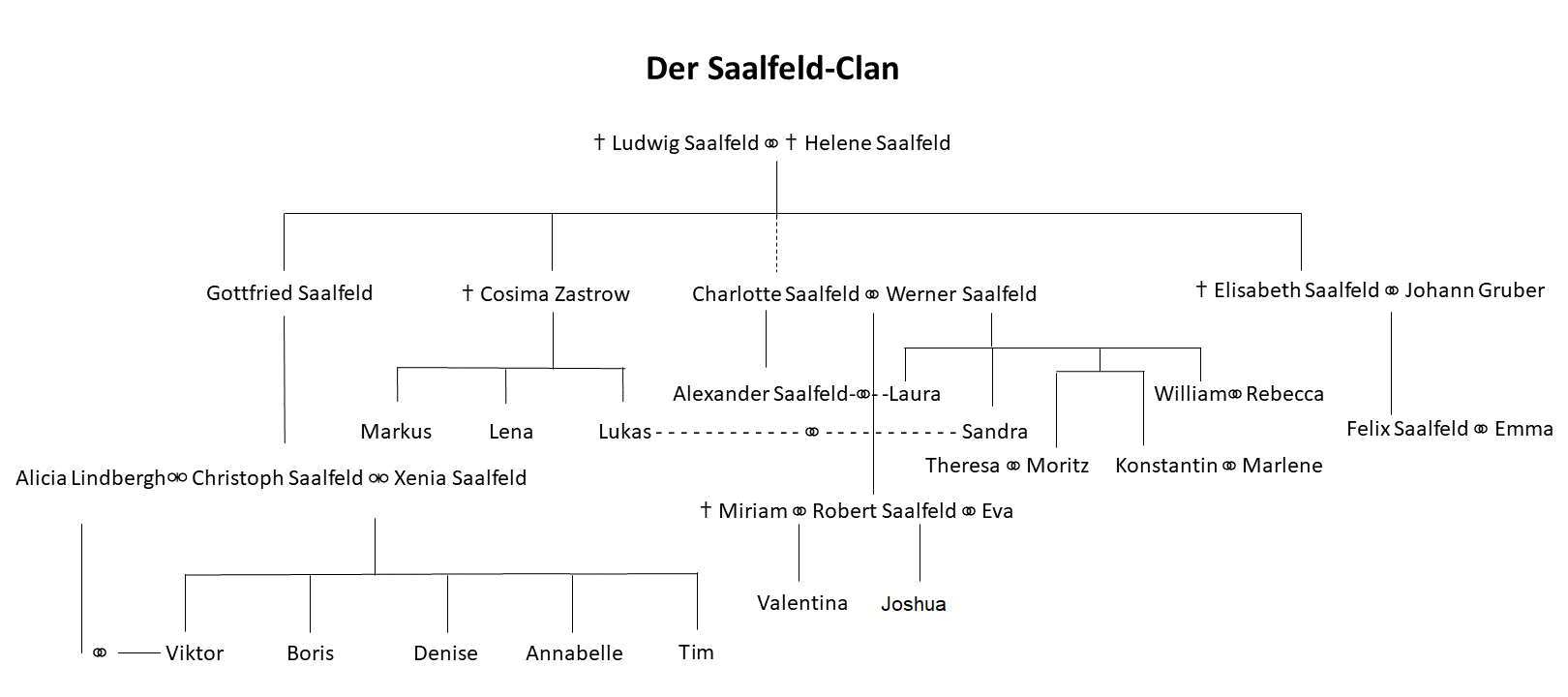 Die Familie Saalfeld: Stand November 2018